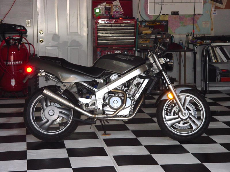 1988 Honda Hawk GT